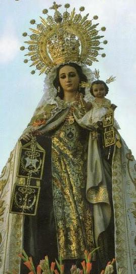 Foto del Cartel de los Cultos del Patronazgo en 2011